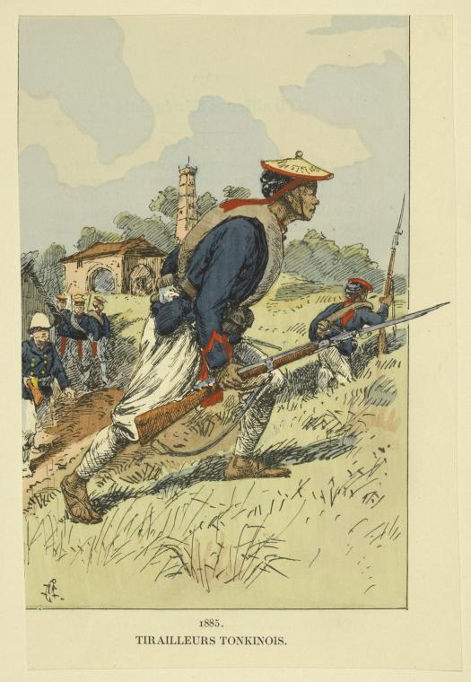 Tonkinese riflemen